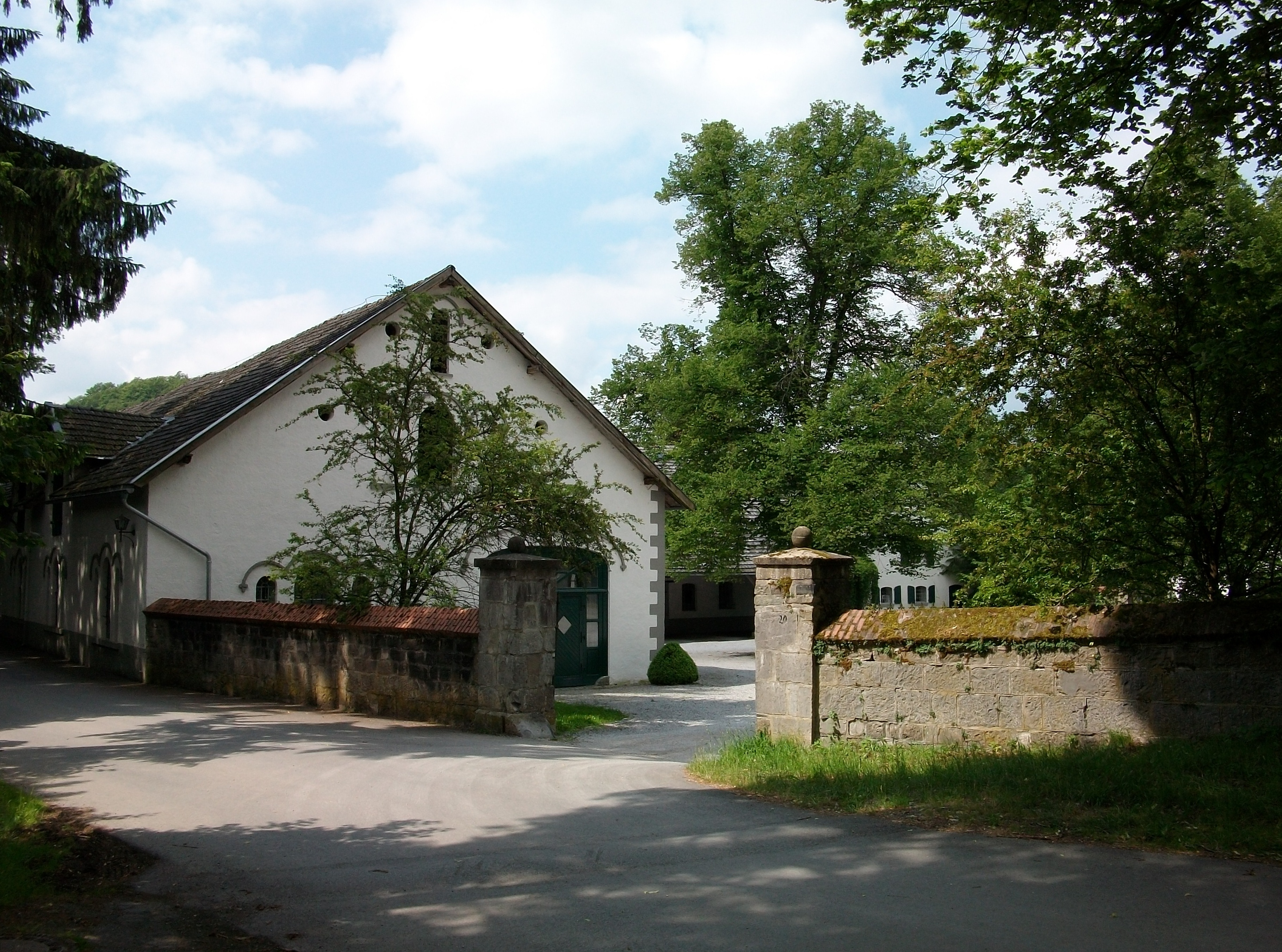 Einfahrt Gut Stockhausen in Meschede (Germany)